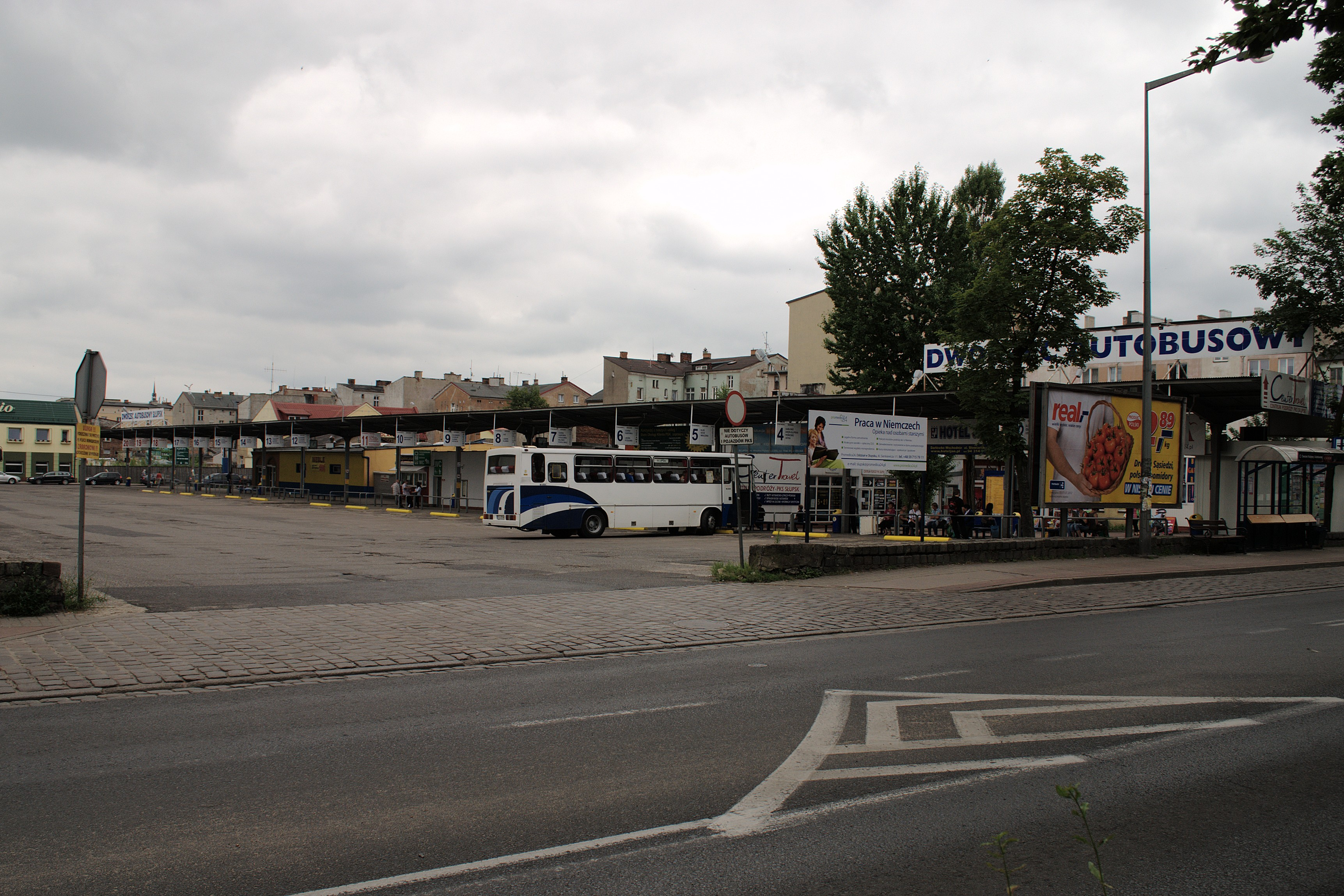 Słupsk. Ulica Kołłątaja. Dworzec PKS.